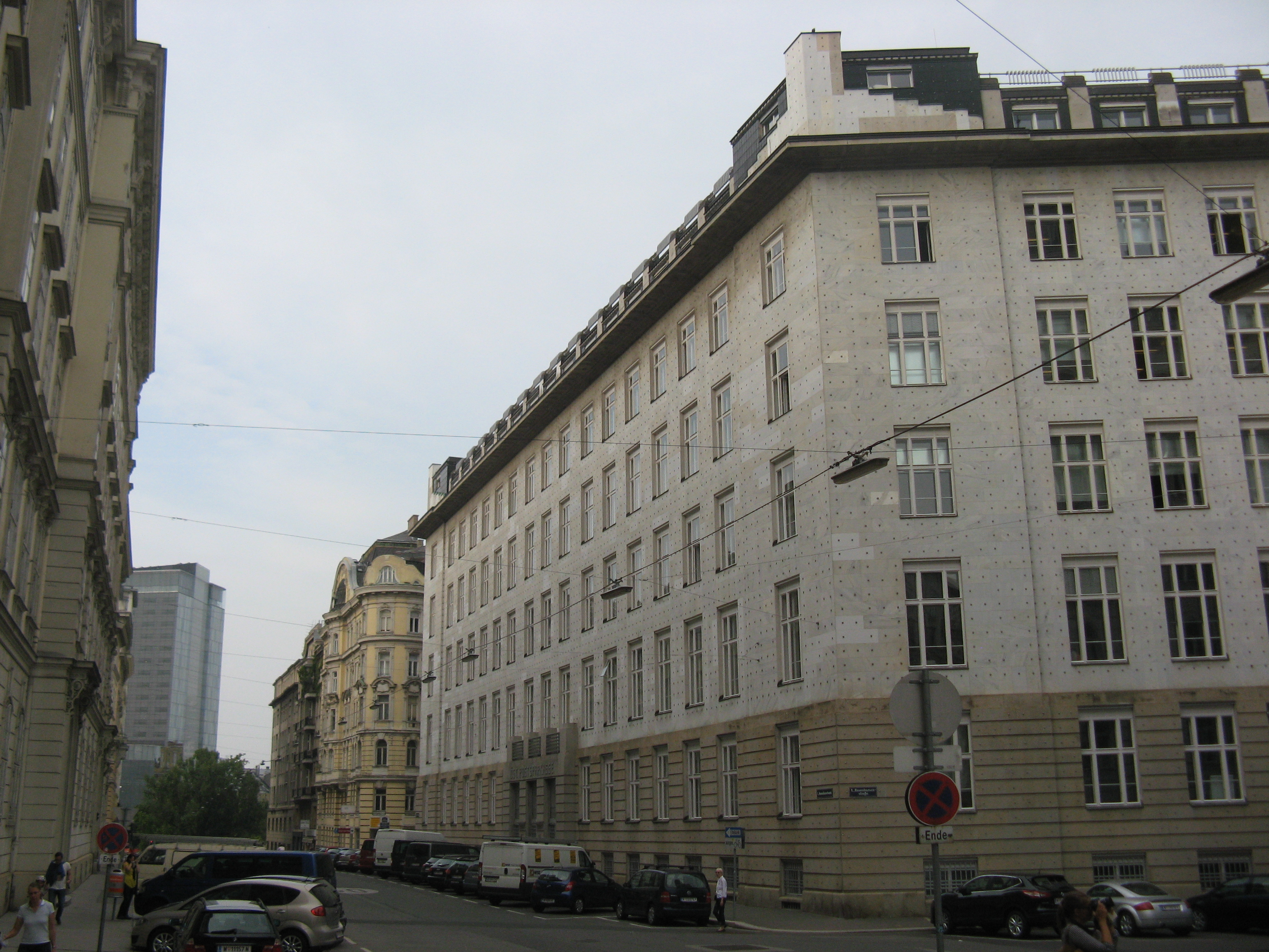 Dominikanerbastei, rechts das Postsparkassengebäude